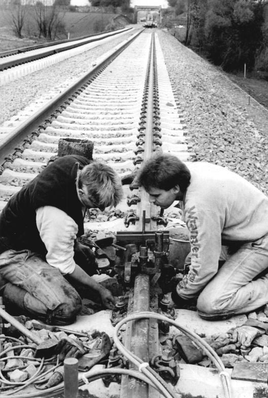 Eisenbahnbau Eichenberg-Arenshausen ADN-Ludwig 26.4.90 Bez. Erfurt-Neue Eisenbahnstrecke-Zügig voran geht der Neubau der 1945 stillgelegten Eisenbahnstrecke von Eichenberg (BRD) nach Arenshausen (DDR). Ab 27. Mai sollen hier D-Zug-Paare zwischen Ost und West verkehren. Um die nötige Laufruhe der Wagen auf der neuen Strecke zu garantieren, werden die Schienen auf großen Längen verschweißt. Holger Pollak (l.) und Andreas Jung von einer Spezialfirma aus Hannover bereiten eine Verschweißung vor. Die neue Eisenbahnstrecke soll Nordhein-Westfalen und Hessen mit dem mitteldeutschen Raum und darüber hinaus verbinden. Die Züge werden zwischen Cottbus und Frankfurt-Main. Nordhausen und Kassel sowie Leipzig und Düsseldorf verkehren.